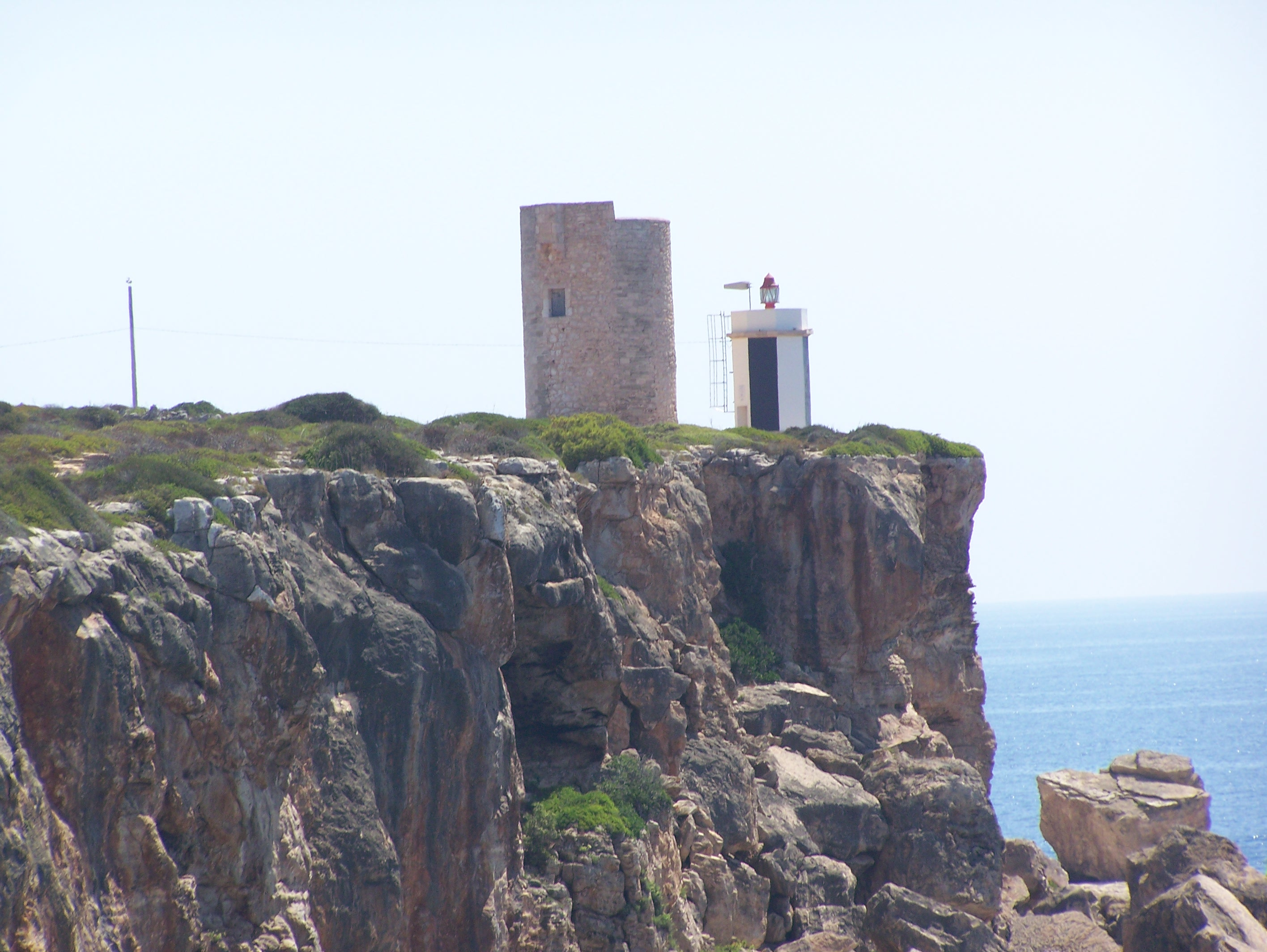 Auf dem Berg von Cala Figuera